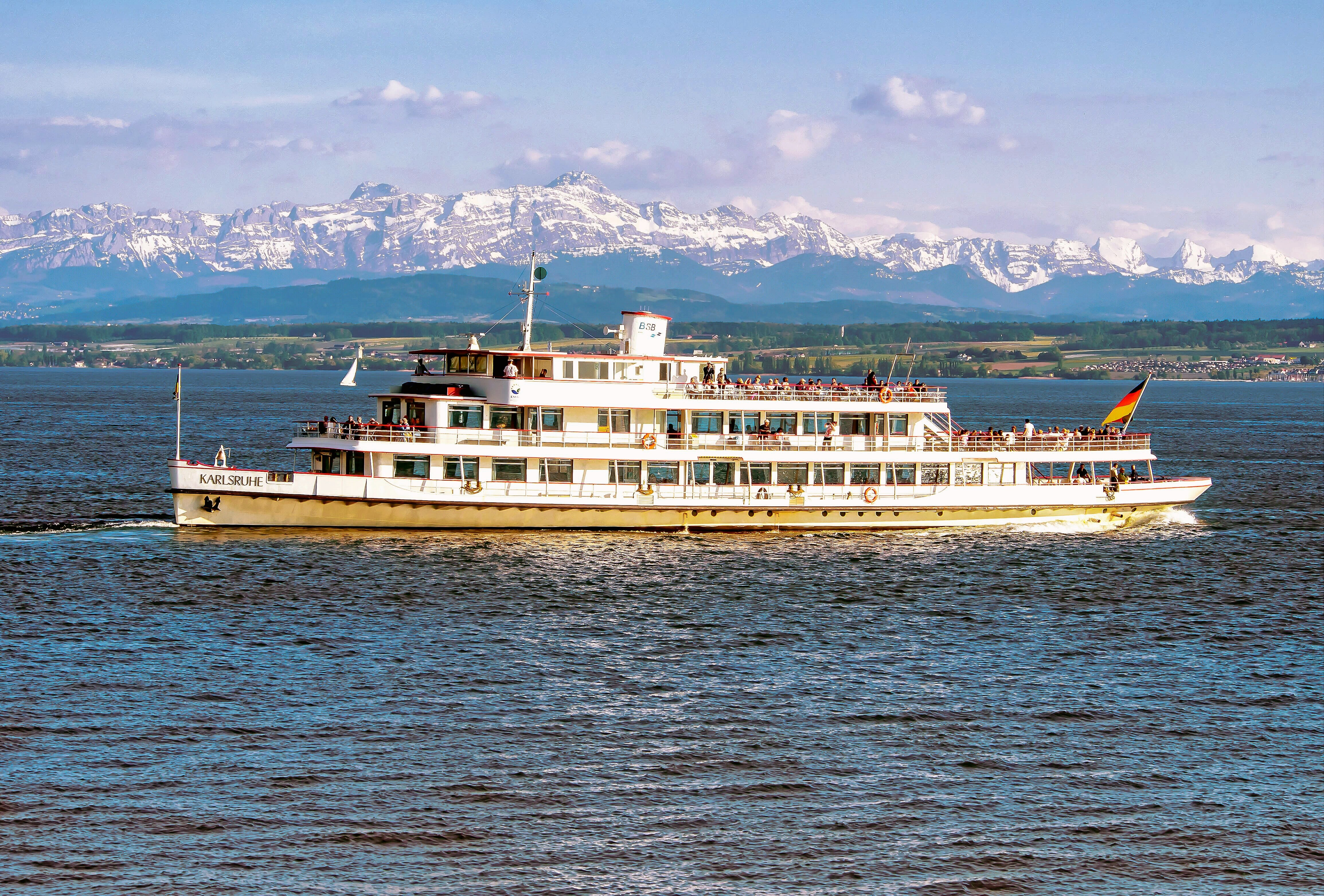 Die "Karlsruhe" vor Meersburg, Blick über den Bodensee zum Säntis